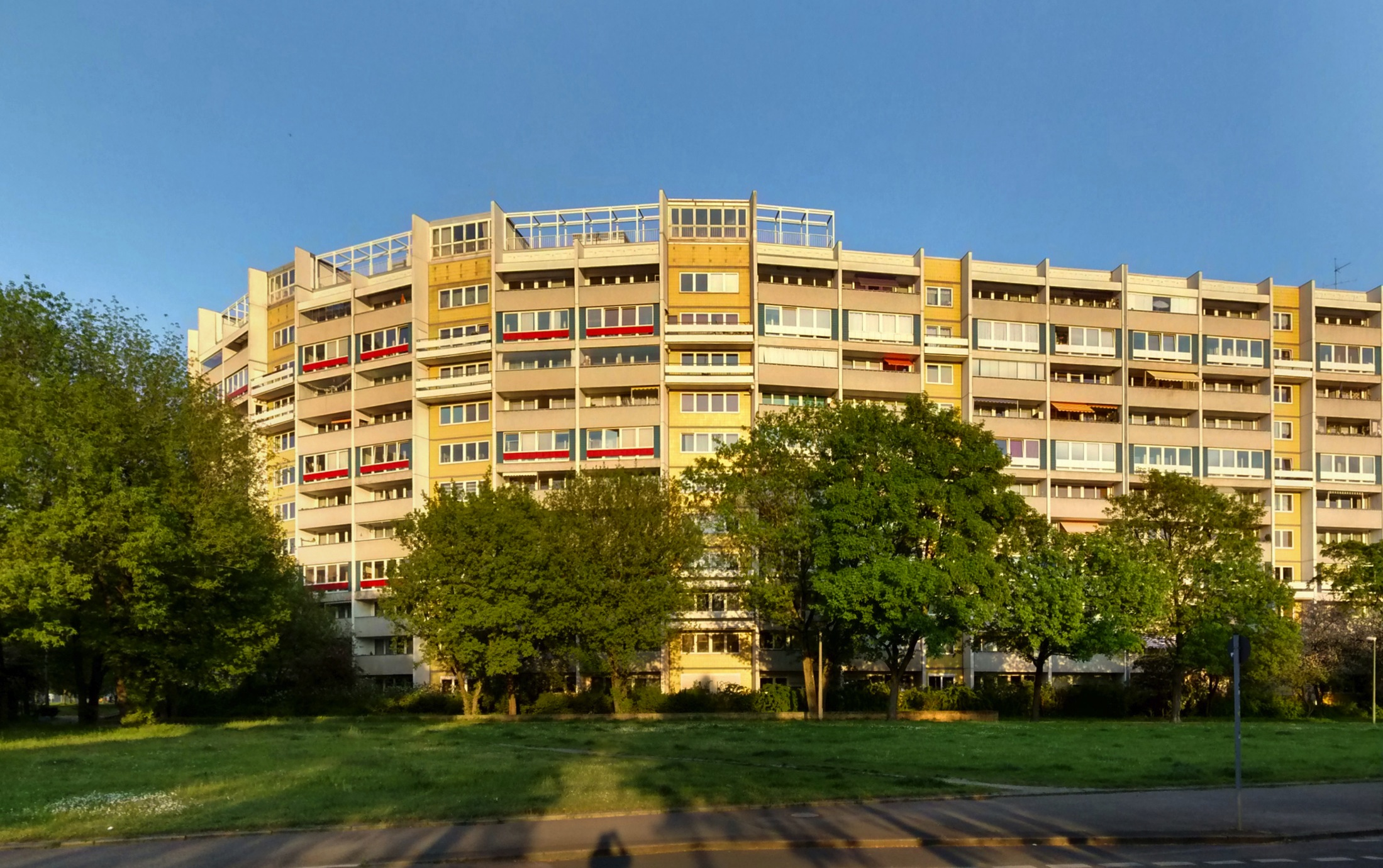 Wohnzeile "Bumerang", Platz der Vereinten Nationen, ehemals Wohnkomplex Leninplatz, Hermann Henselmann (Wettbewerbsentwurf), Heinz Mehlan und Kollektiv (Ausführungsplanung), 1968–1970, Berlin-Friedrichshain, Plattenbau Typ P2/11, Mai 2016